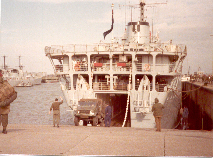 Navire de transport Sir Percivale L3036 déchargement